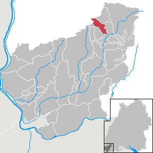 Aitern, Landkreis Lörrach, Baden-Württemberg